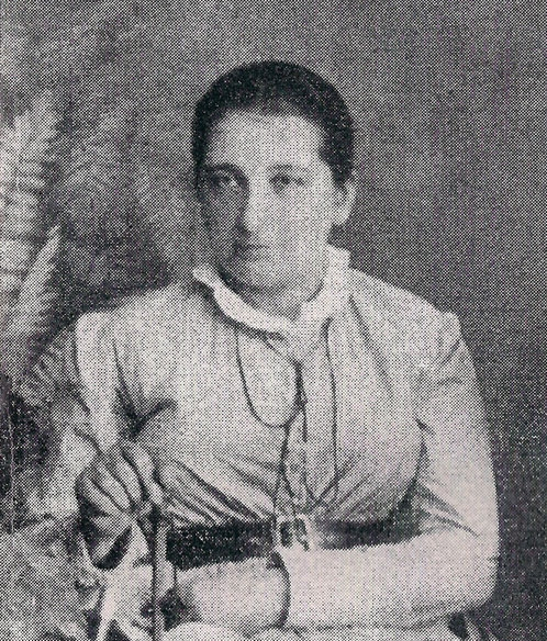 Medic din Bulgaria